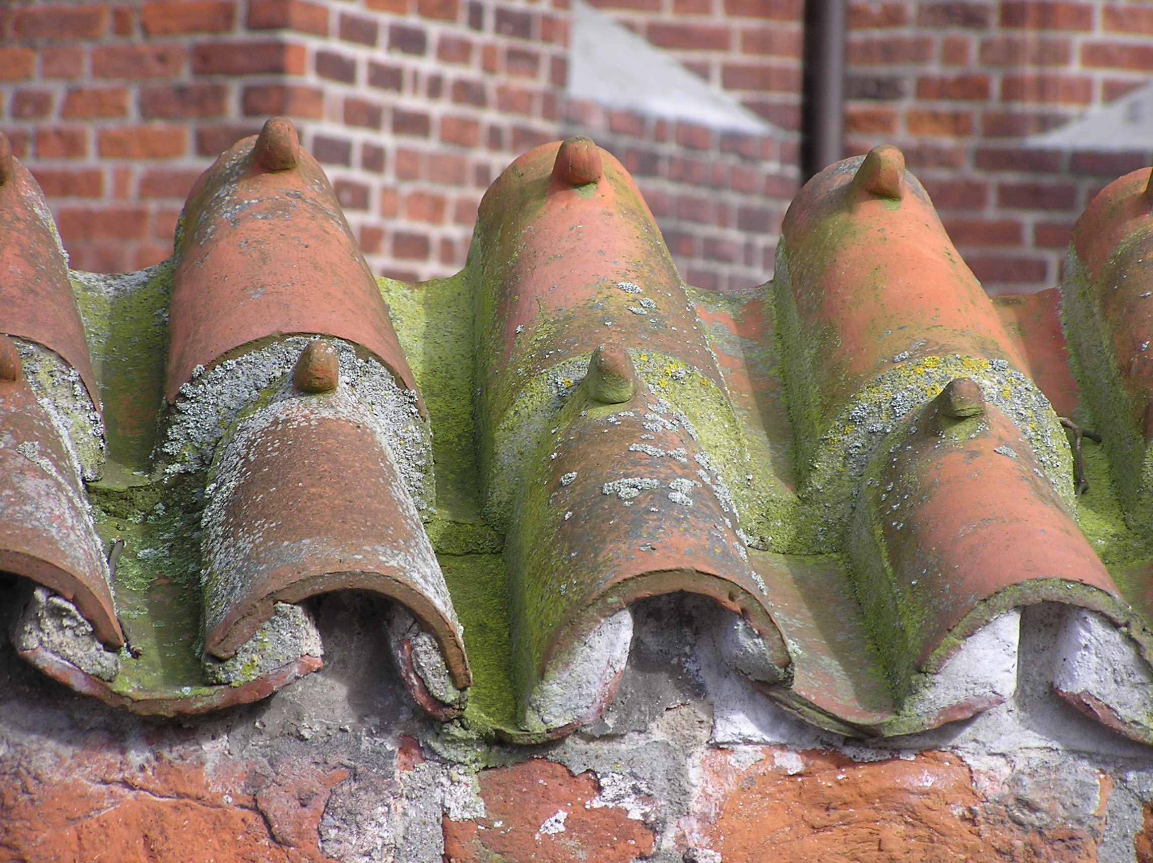 Danmark Sjælland Kirche Kalundborg: Mönch und Nonne